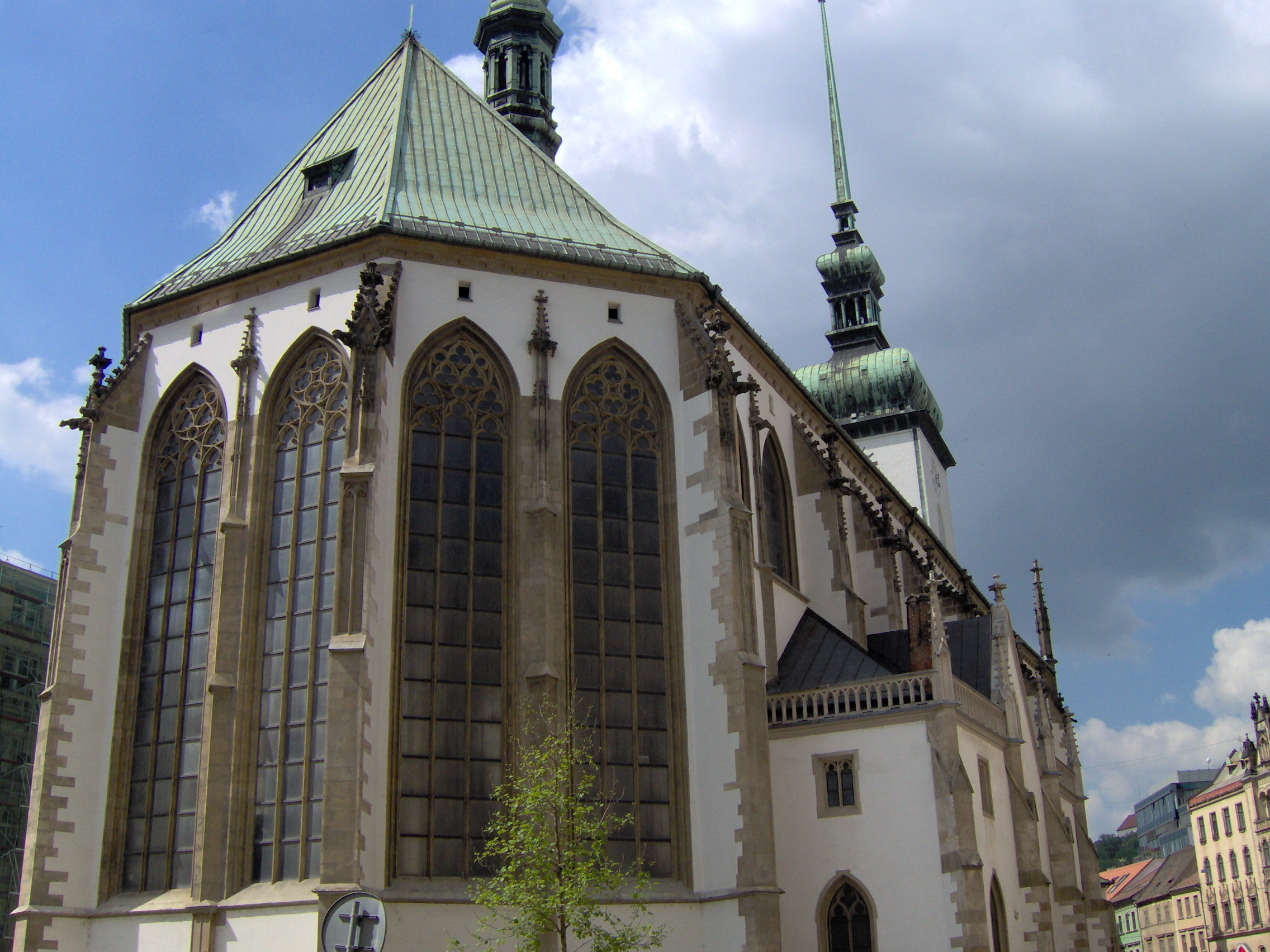 Pohled z ul. Běhounské na kostel Sv. Jakuba v Brně